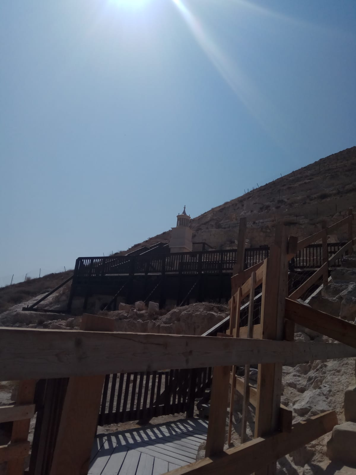 שחזור משוער של קבר הורדוס